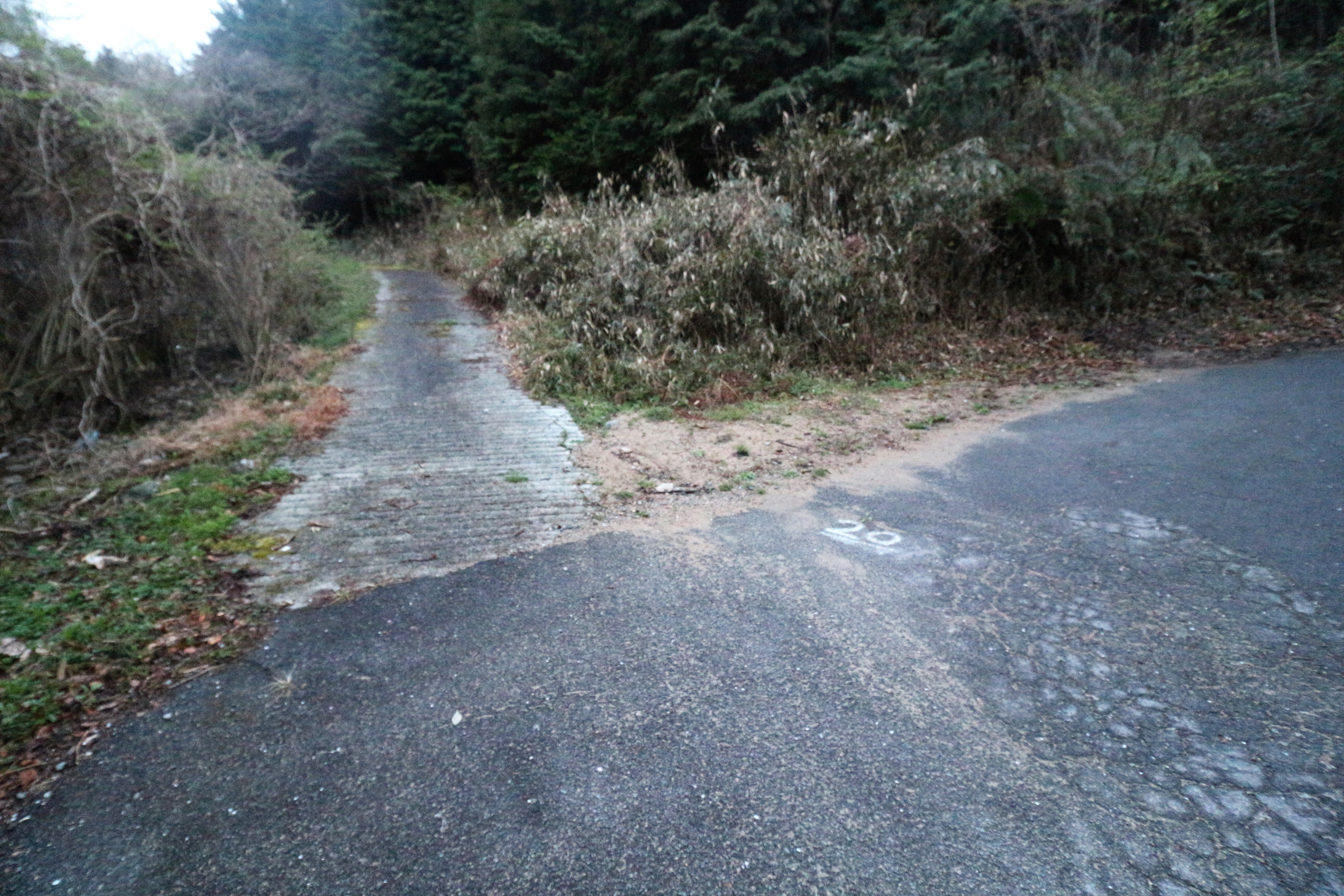 広島県福山市芦田町の大谷砂留。渓流Cへの山道分枝。